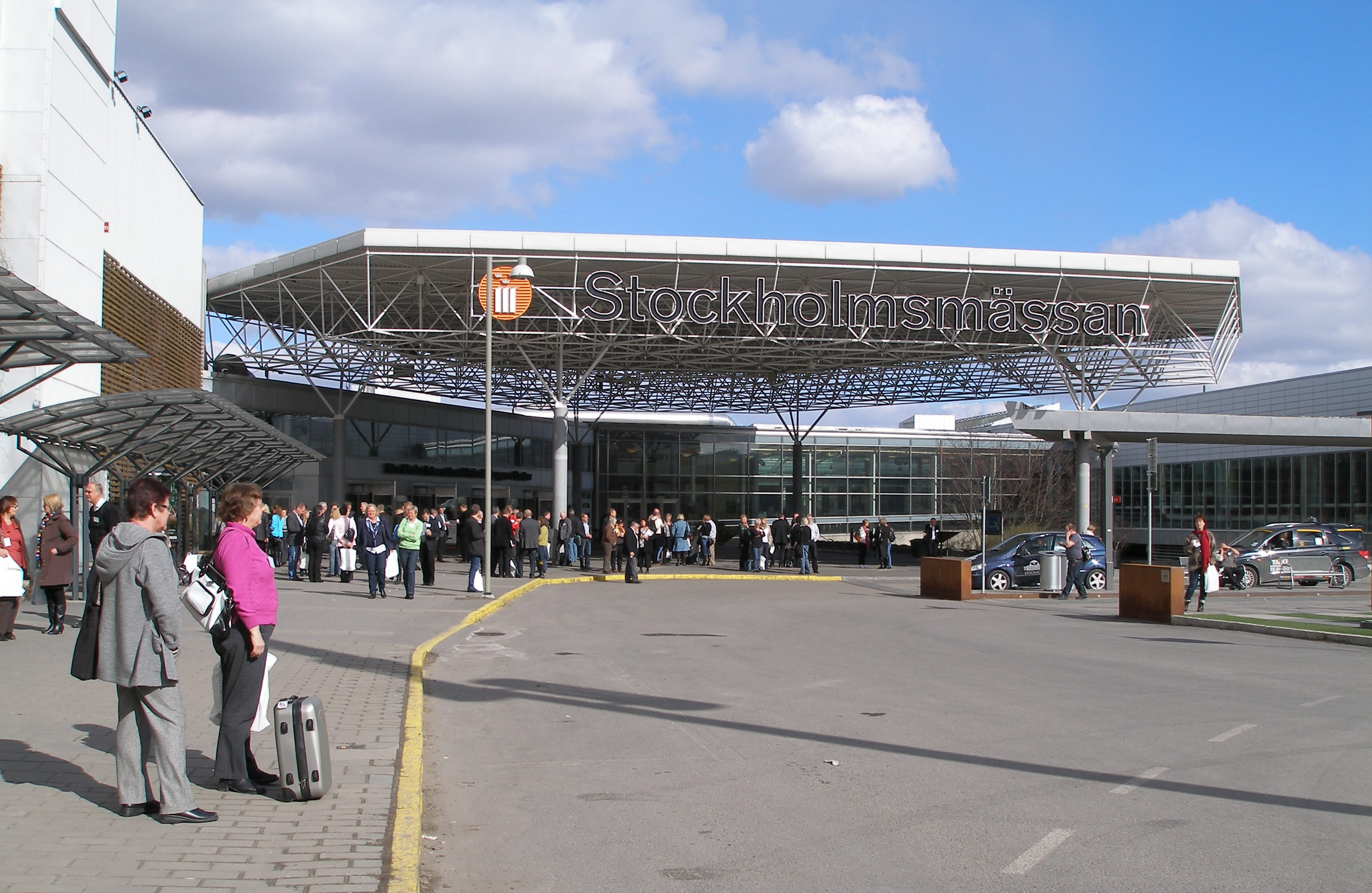 Stockholmsmässan under Kommunal skolriksdag 25/3 2009.